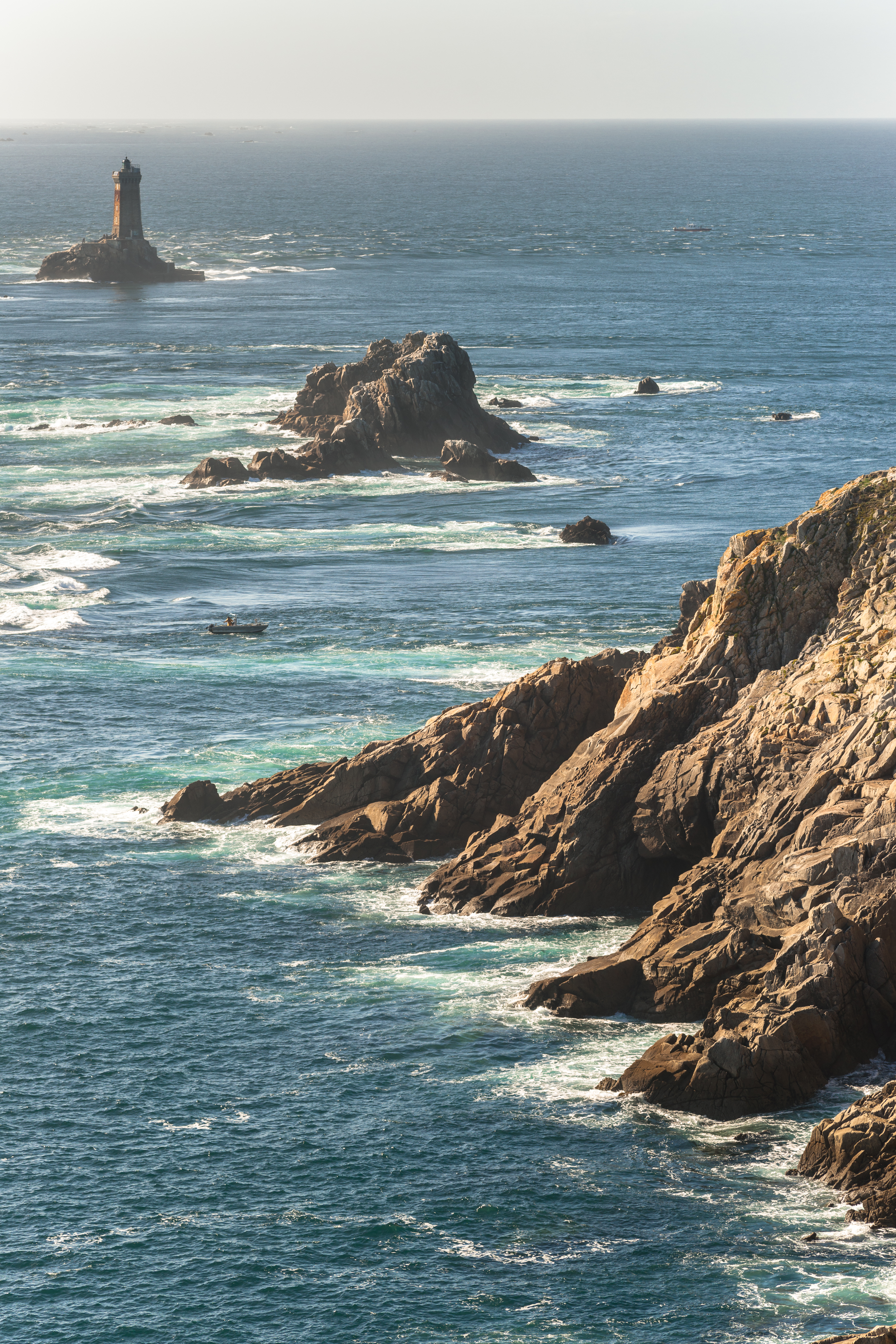 Fischen in der Raz de Sein. Die Strömungen über den Unterwasserfelsen erreichen bis zu 6 Knoten.